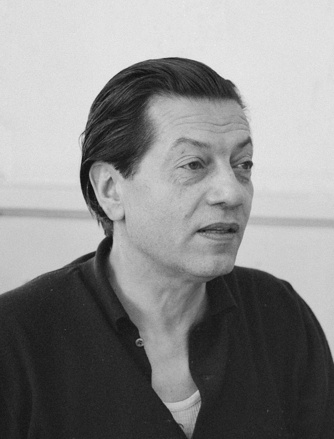 Serge Lifar bij repetitie van Nederlands Ballet